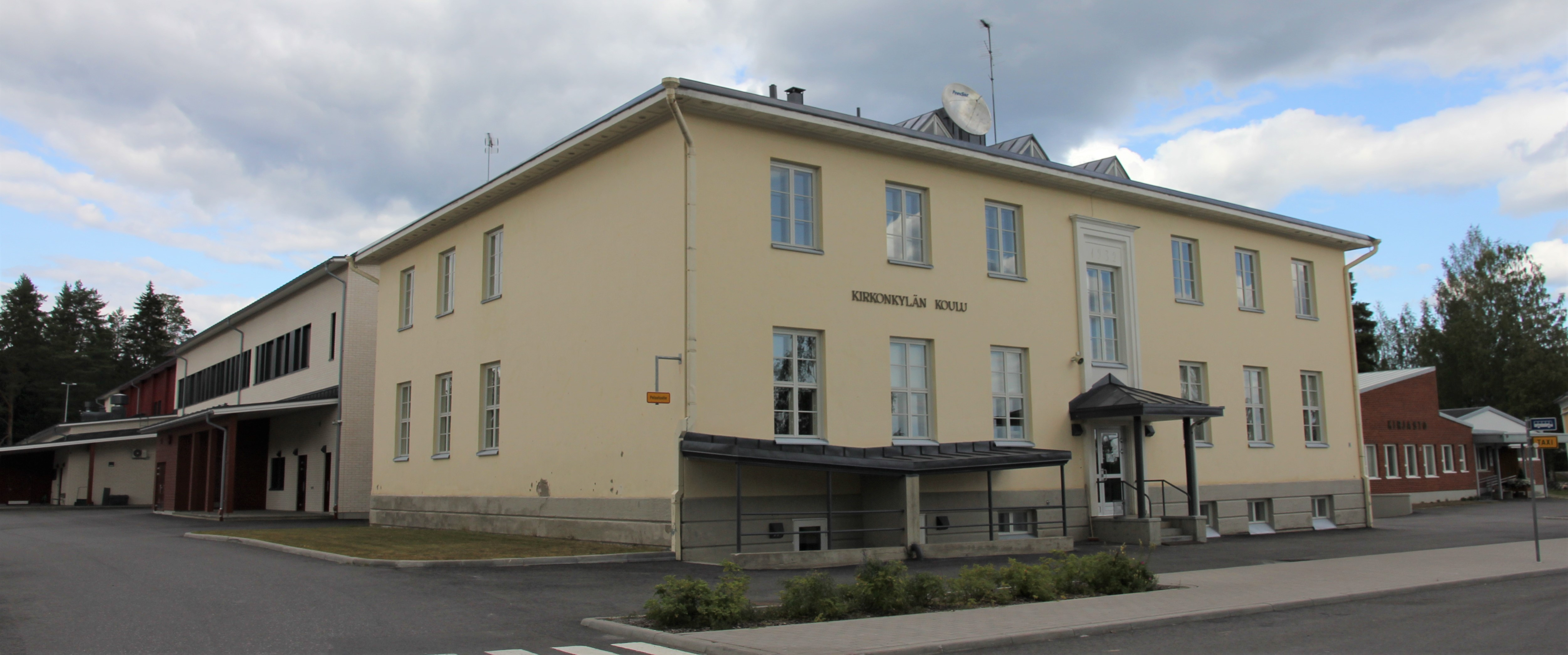 Kaavin koulu eli Kirkonkylän koulu on Pohjois-Savon Kaavilla, osoitteessa Kaavintie 24 A toimiva peruskoulun alakoulu.